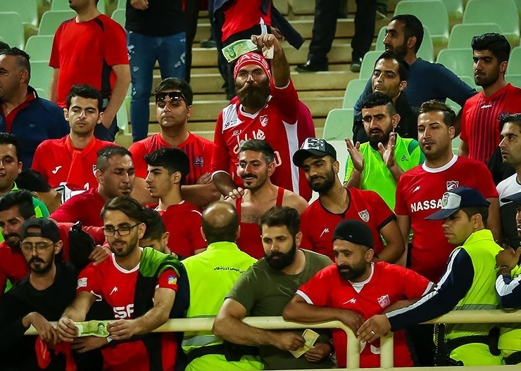 مازِرونی: نساجی و سپاهان ِکای عکس‌ها که 1398 رفت صوه شنه